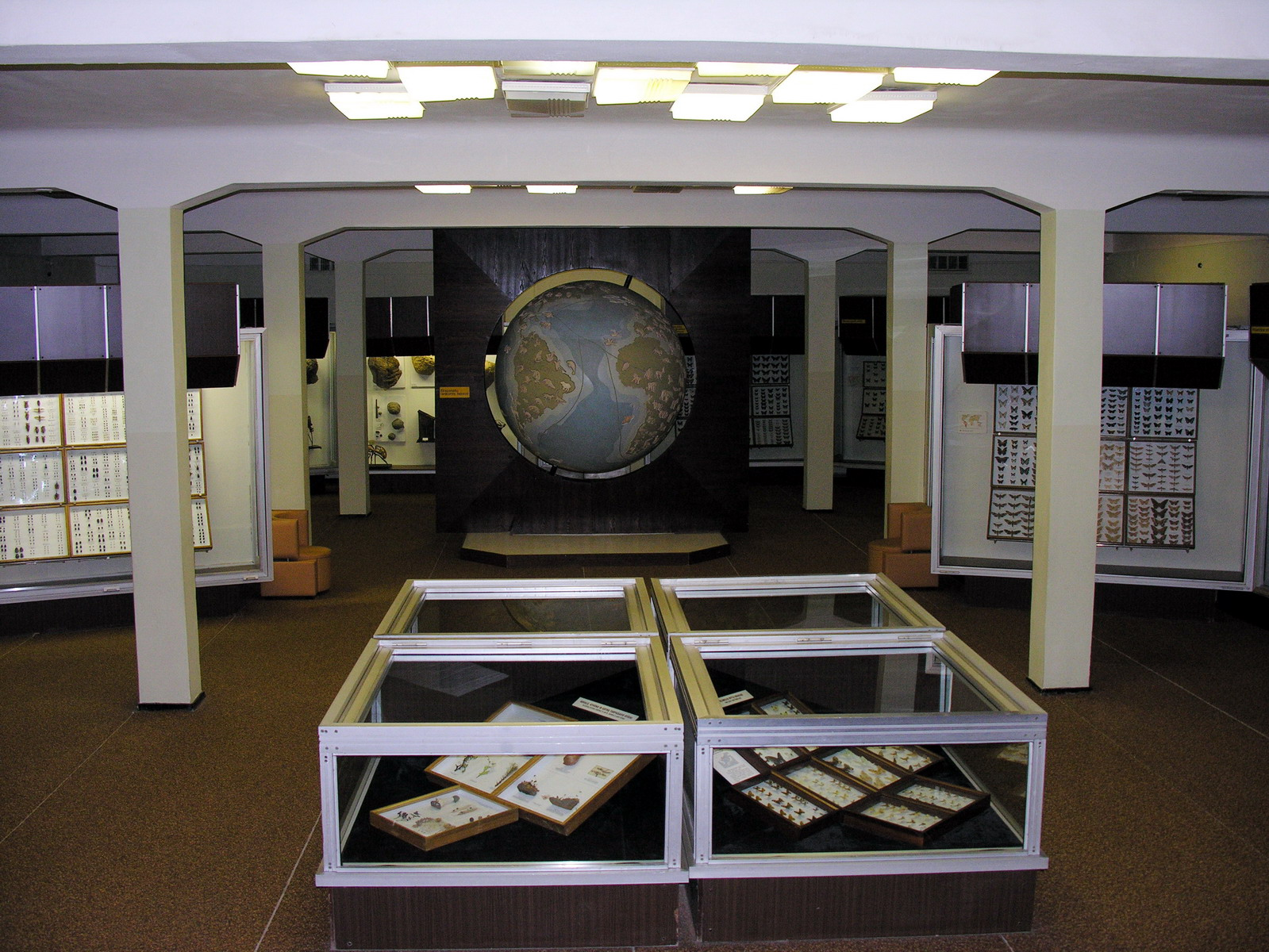 Kauno Tado Ivanausko zoologijos muziejus, 2006 m. gruodžio 2 d.